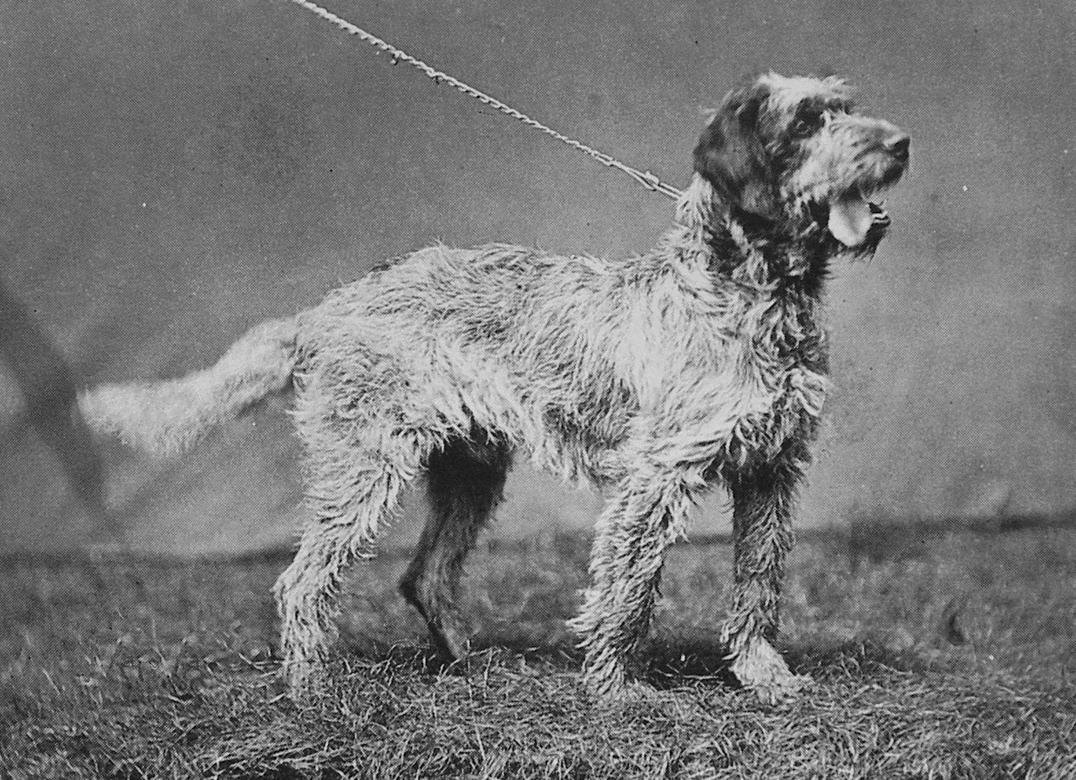 Hunderasse Griffon_a_poil_laineux